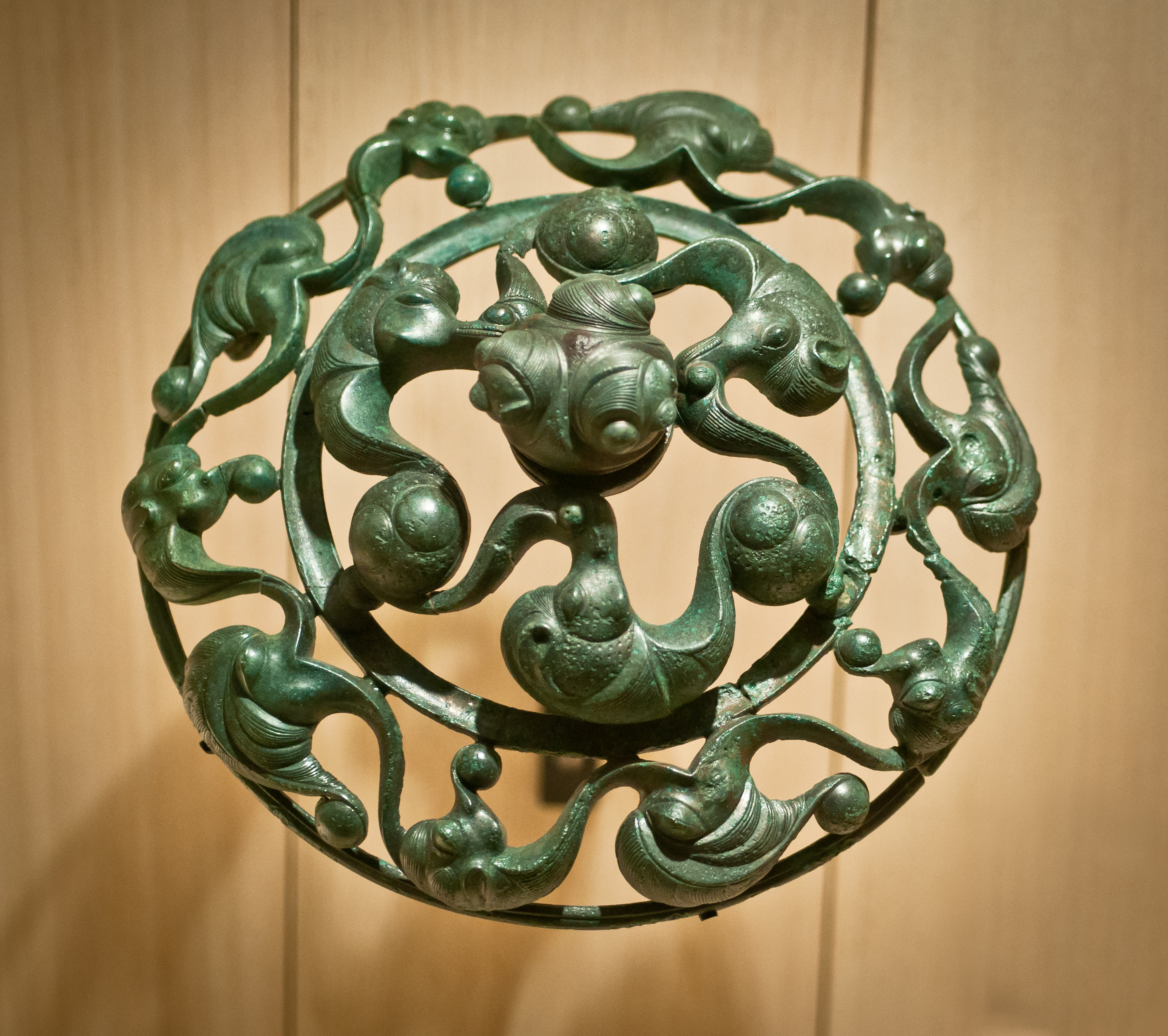 Applique en Bronze gaulois ornant à l'origine le joug d'un char, dénommé Dôme au dragon, retrouvé à La Fosse Cotheret, commune de Roissy en France (Val d'Oise). Voir la description sur le site officiel du musée. Collections du Musée d'Archéologie National Tombe à char 1002 MAN 89206.23